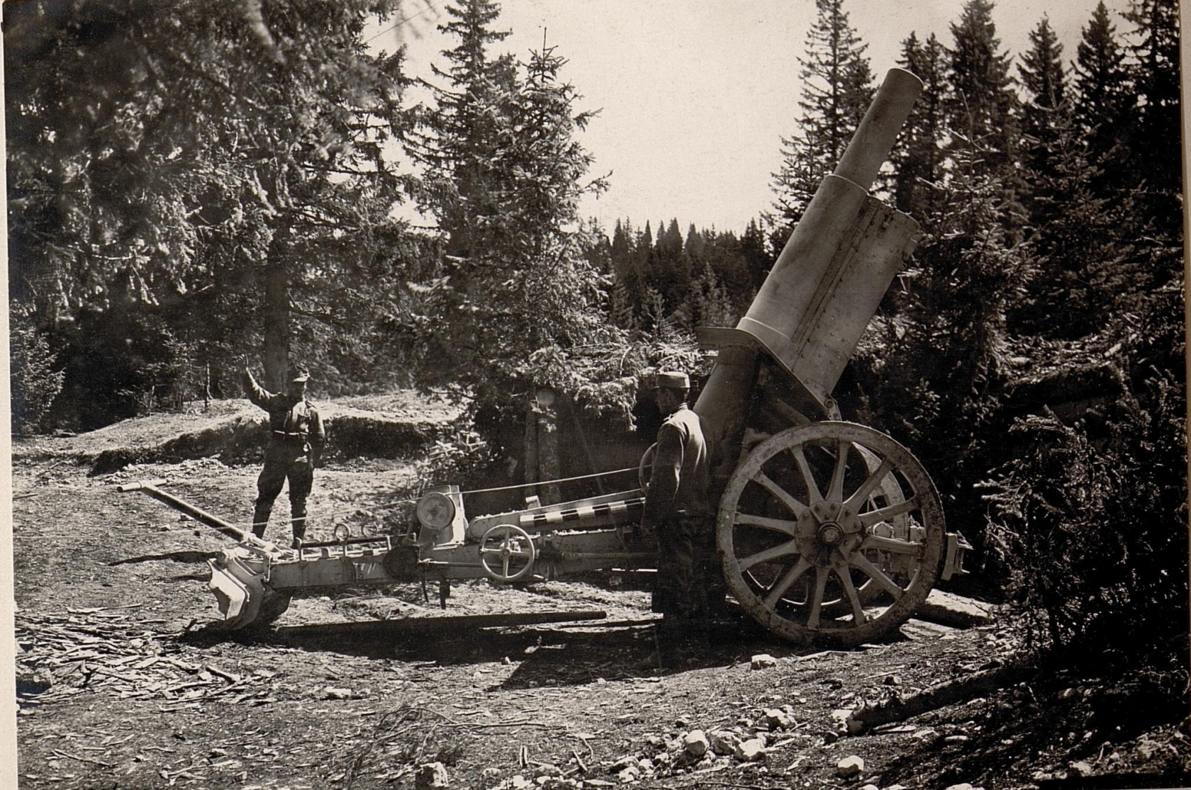 Lavaroneplateau. 15 cm Kanone.